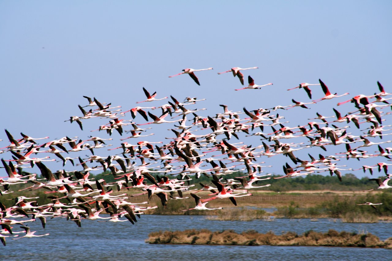 Flamingos, Naturschutzgebiet, Etang la Pissevache, Saint Pierre la mer